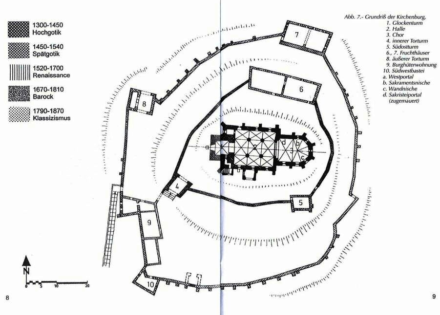 Planul ansamblului fortificat de la Apold.